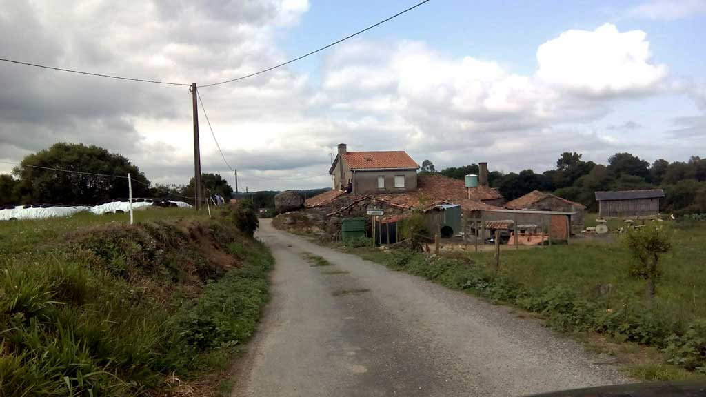 Vista de Barroso, Curtis.